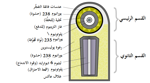 رسمٌ بيانيٌّ يُوضِّح الأقسام الرئيسيَّة لِقُنبُلة تيلر-أولام الهيدروجينيَّة.